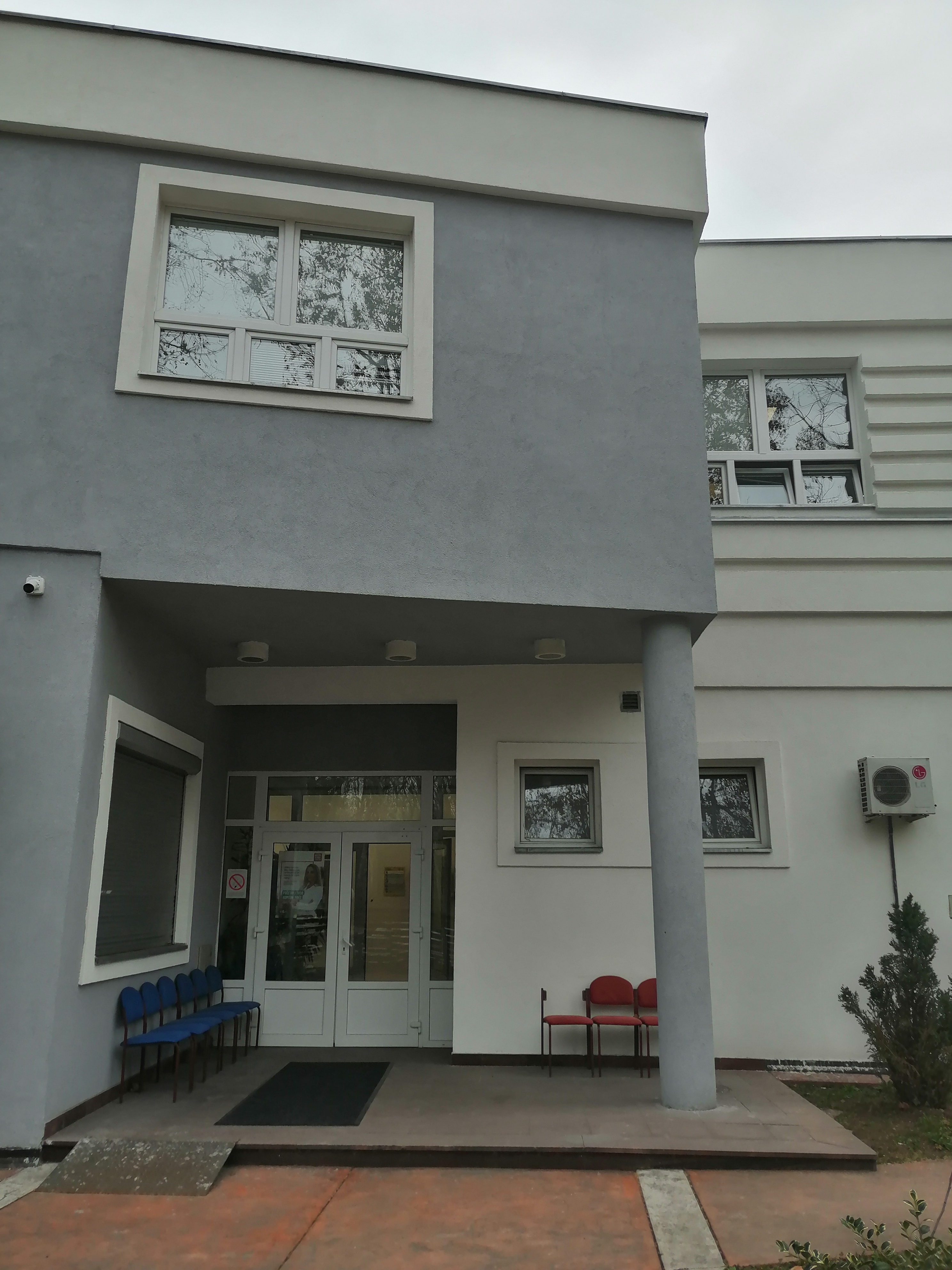 Fakultet organizacionih nauka, Beograd